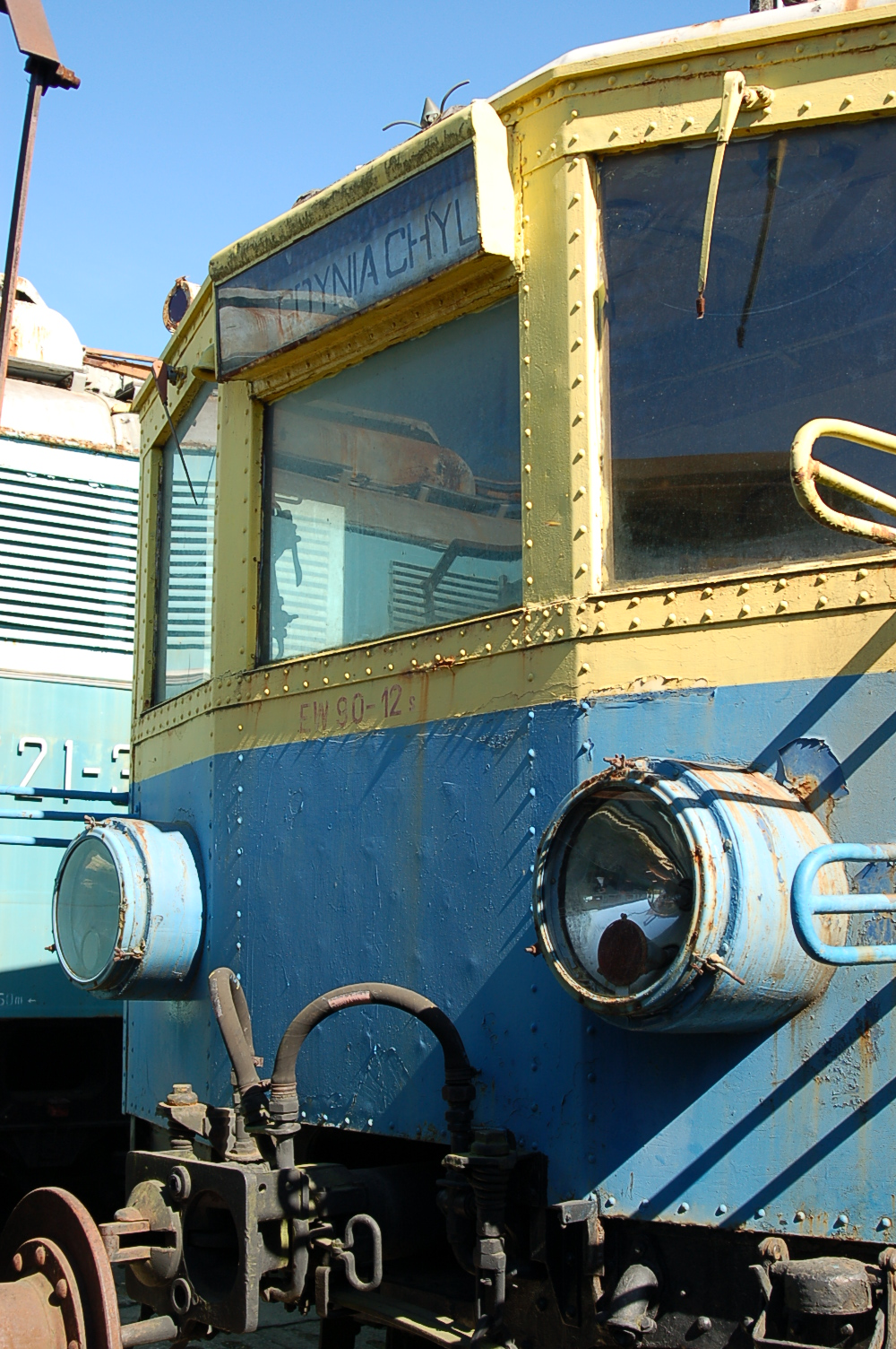 EW90-12 znajdujący się obecnie w Skansenie w Kościerzynie.